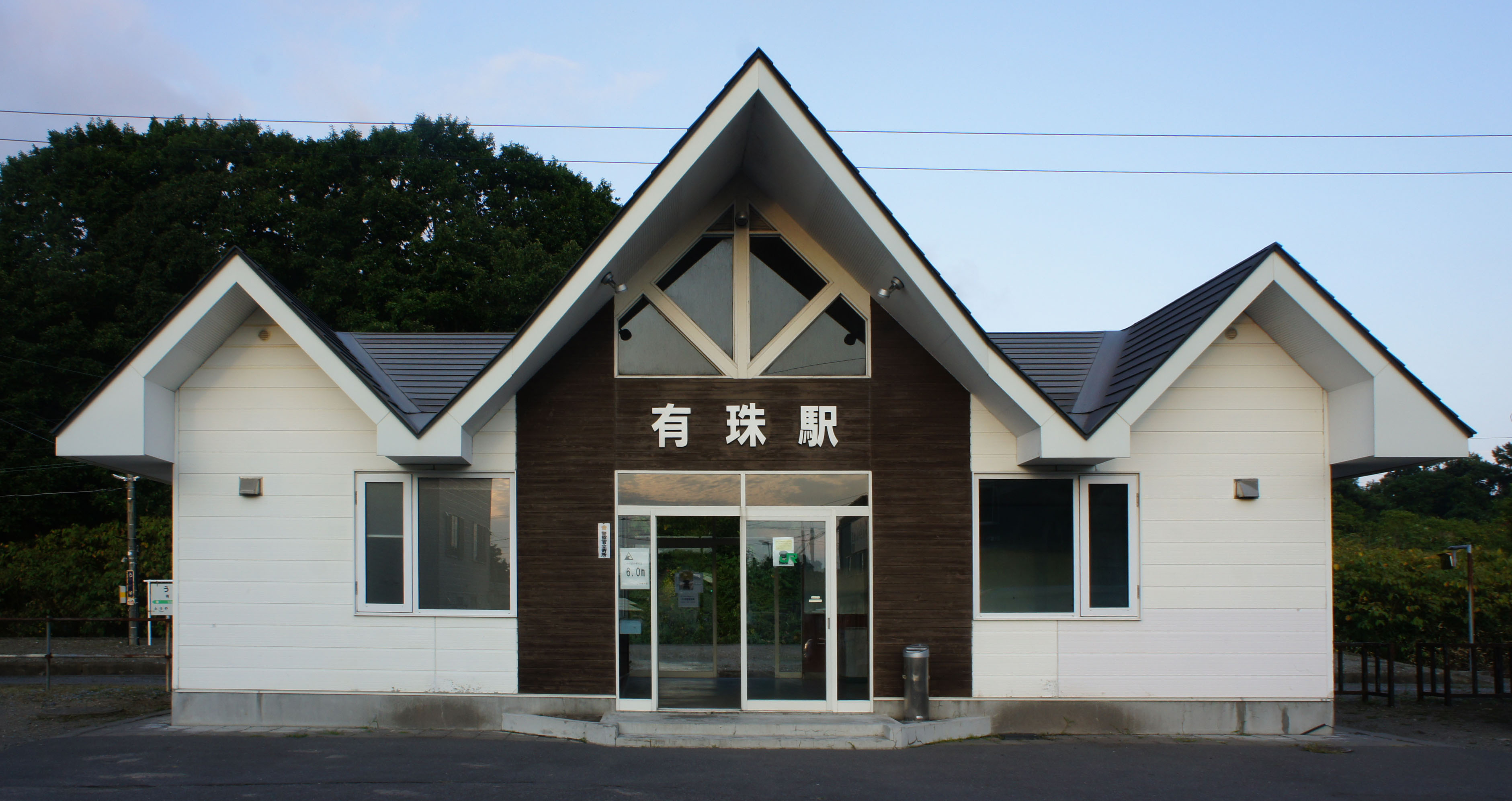 JR室蘭本線・有珠駅の駅舎